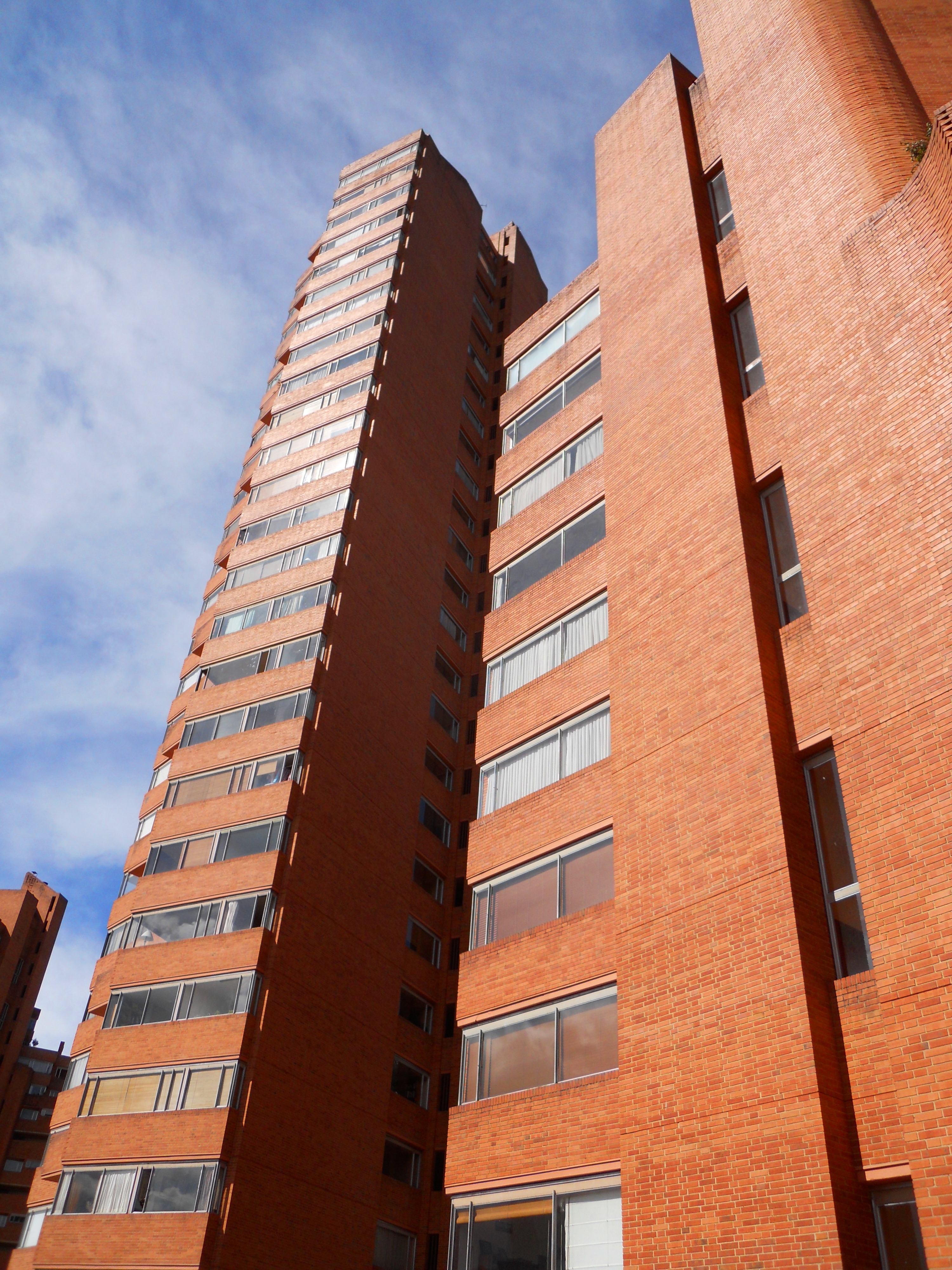 Torres del Parque A & B, Bogotá, costado suroccidental.